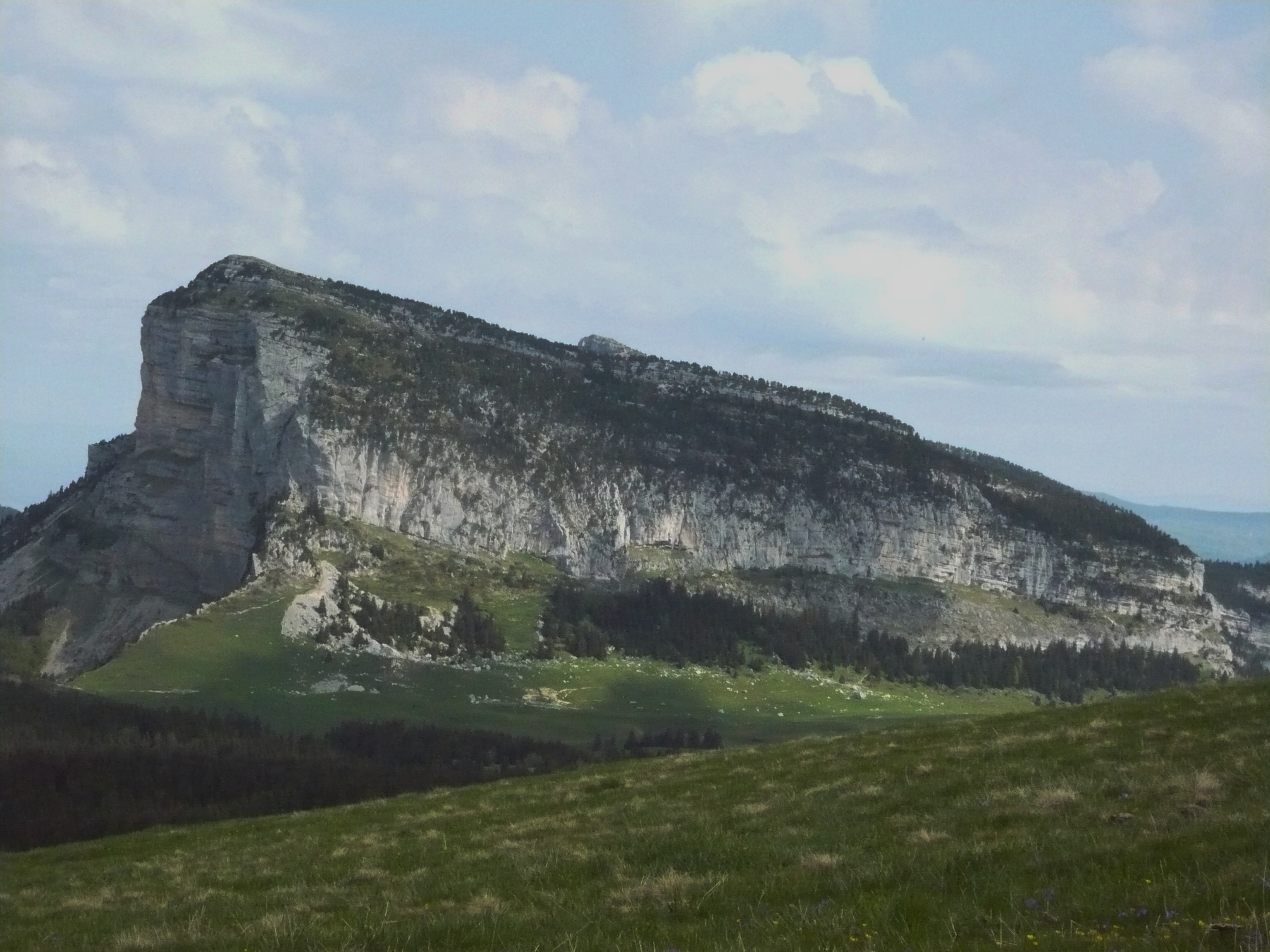 Le vallon ou se développe 350 m sous terre le réseau de l'Alpe.